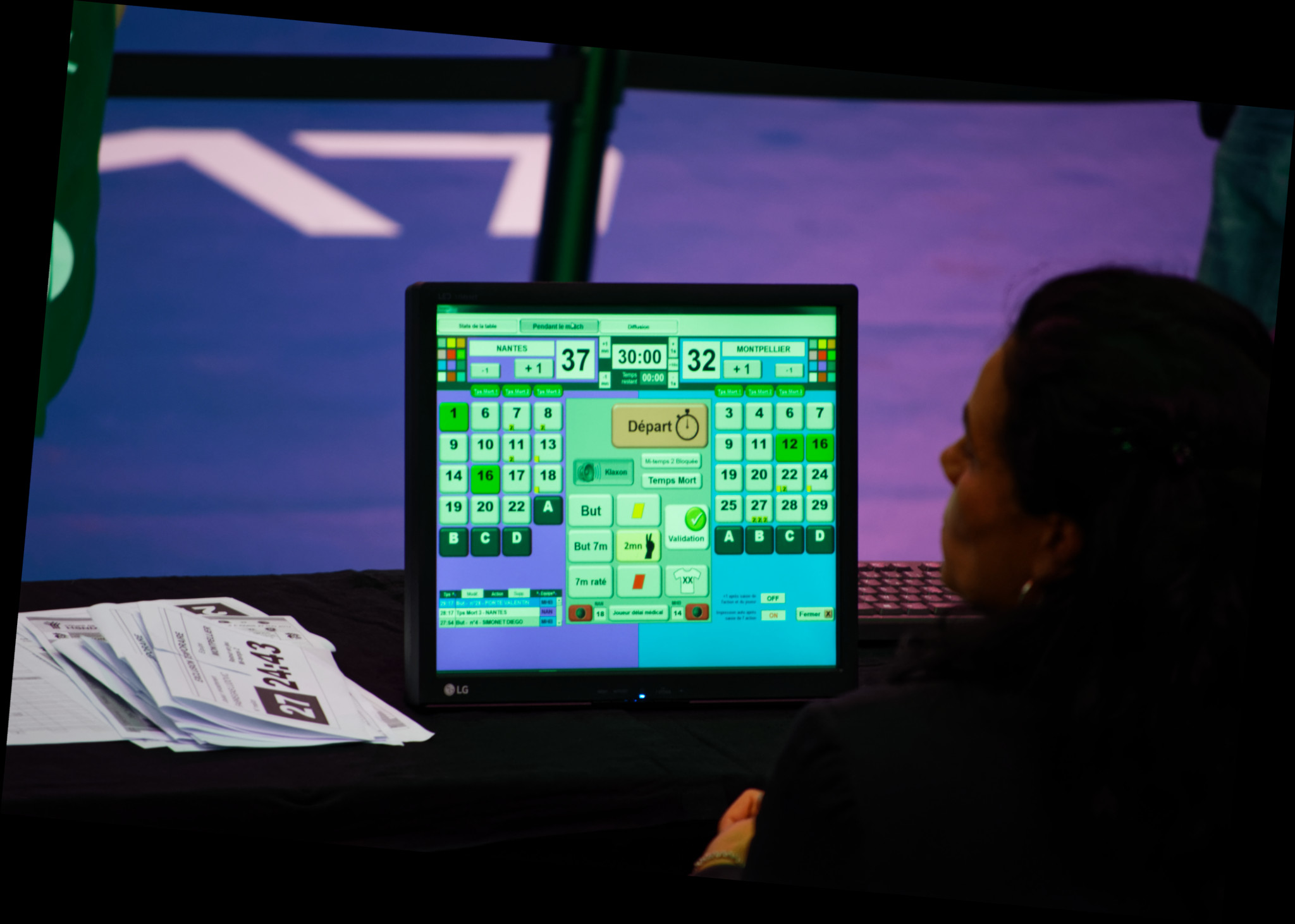 finale de la Coupe de France de handball 2016-17 entre Montpellier et Nantes. Score final sur la table de marque. A Bercy, le 27 mai 2017.